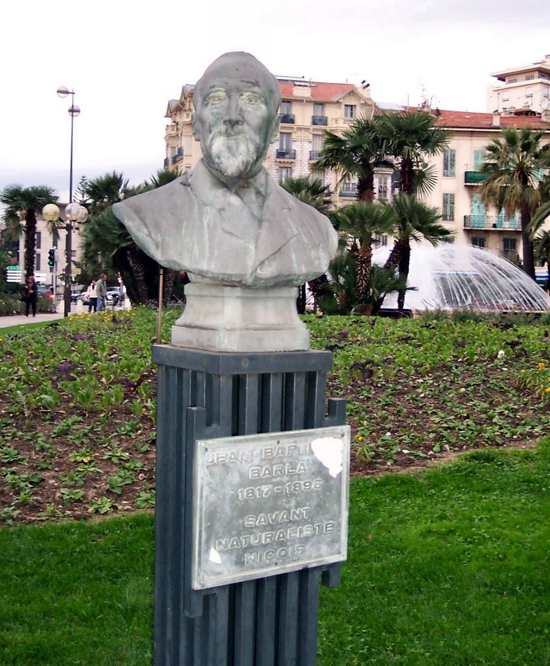 Nice-Promenade du Paillon, Buste de Jean-Baptiste Barla